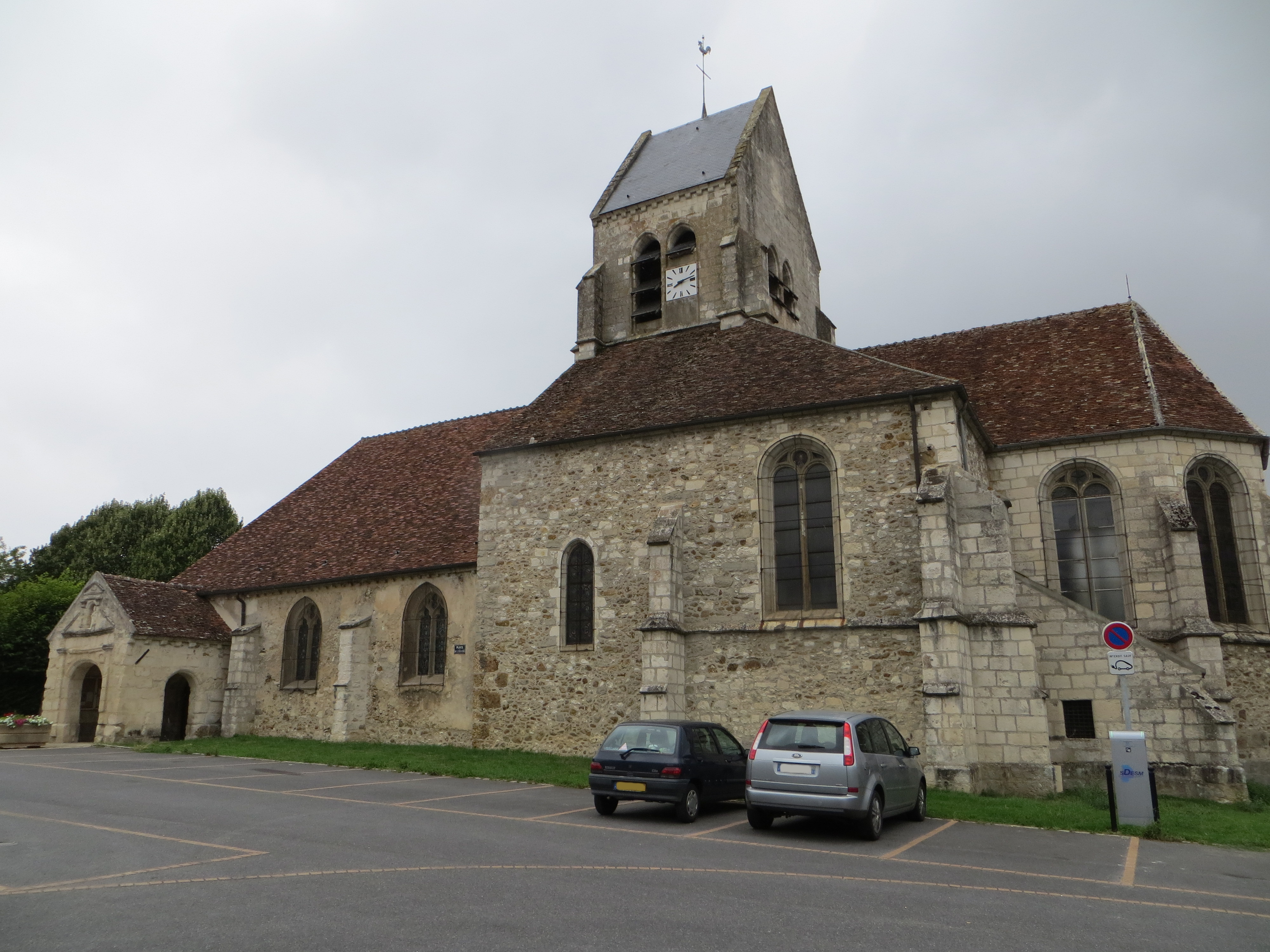 Vue générale de l'église